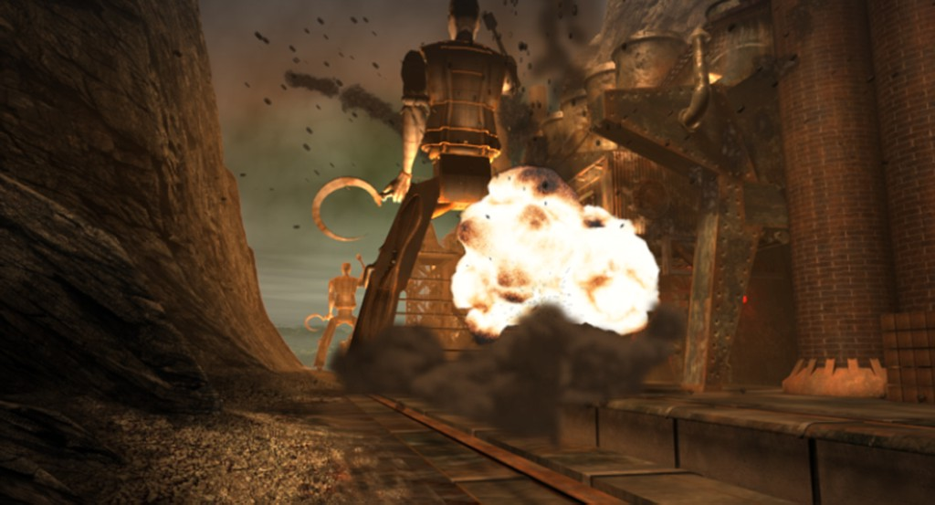 Capture d'écran du jeu vidéo Syberia (2002), développé et édité par Microïds. Image de la cinématique de la fuite de Kate Walker hors de Komkolzgrad durant l'une des dernières grandes péripéties de l'aventure.